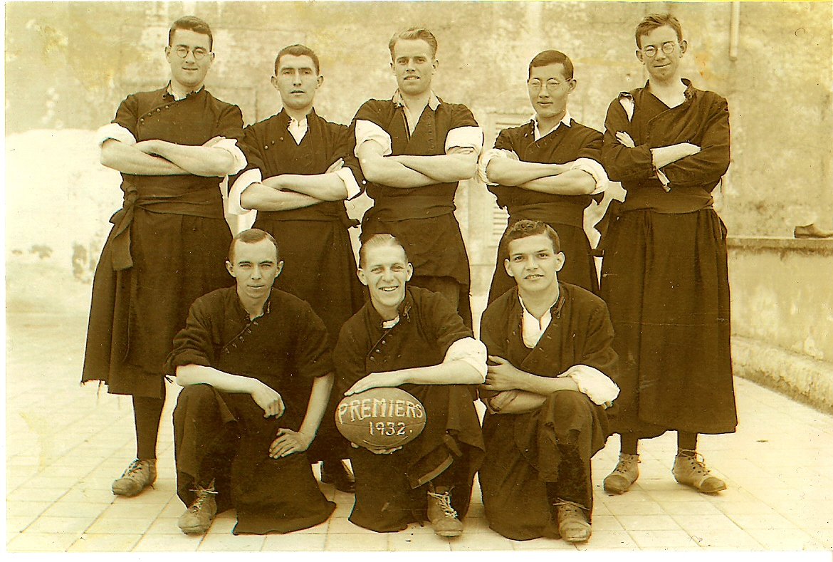 Alunni del Pontificio Collegio Urbano De Propaganda Fide nell'Anno Accademico 1931-1932, ultimo della Prefettura del Cardinale Willem Marinus van Rossum, venuto a mancare il 30 agosto 1932.